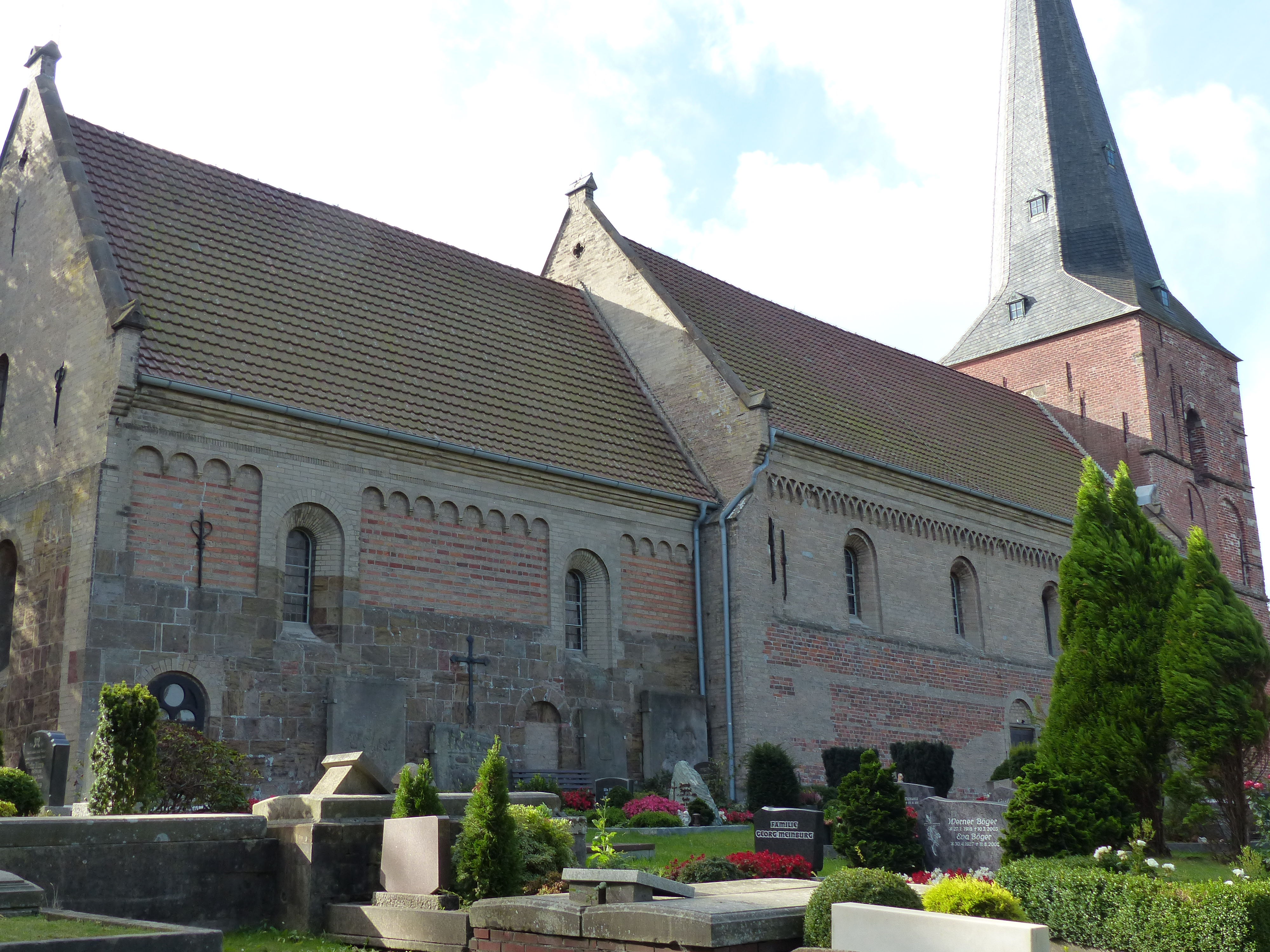 Kirche in Blexen, Nordseite von Chor und Schiff mit Turm